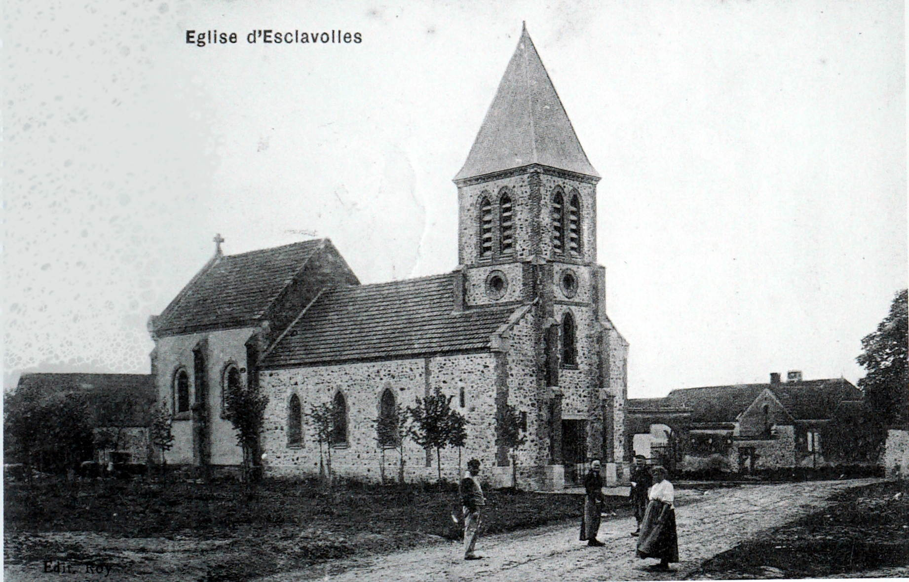 vue sur une carte ancienne.